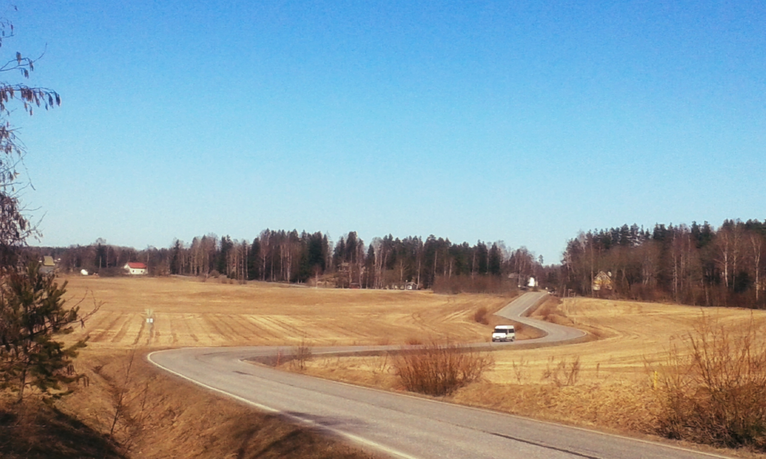 Numlahden maalaismaisemaa